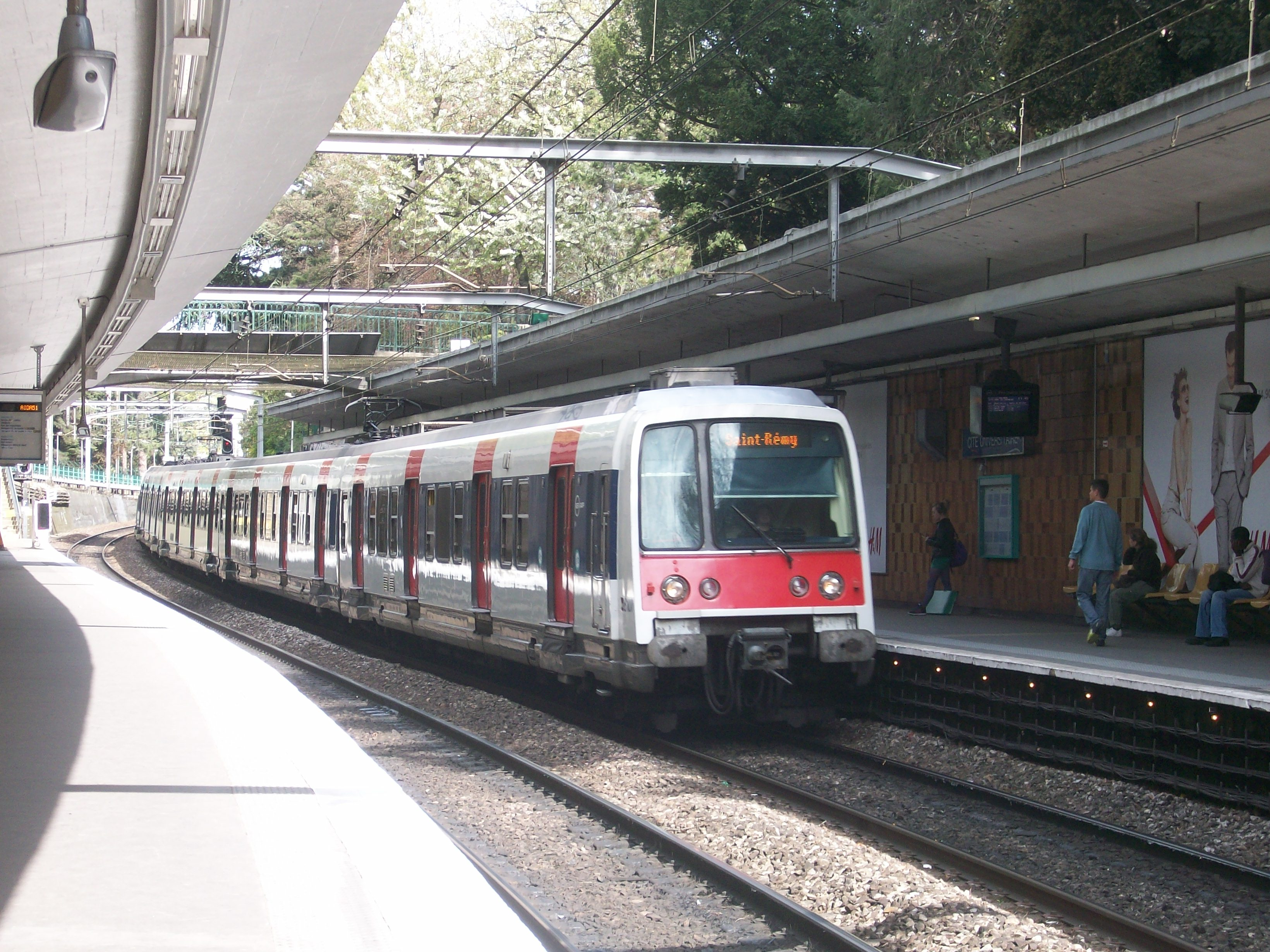 MI 79 du RER B